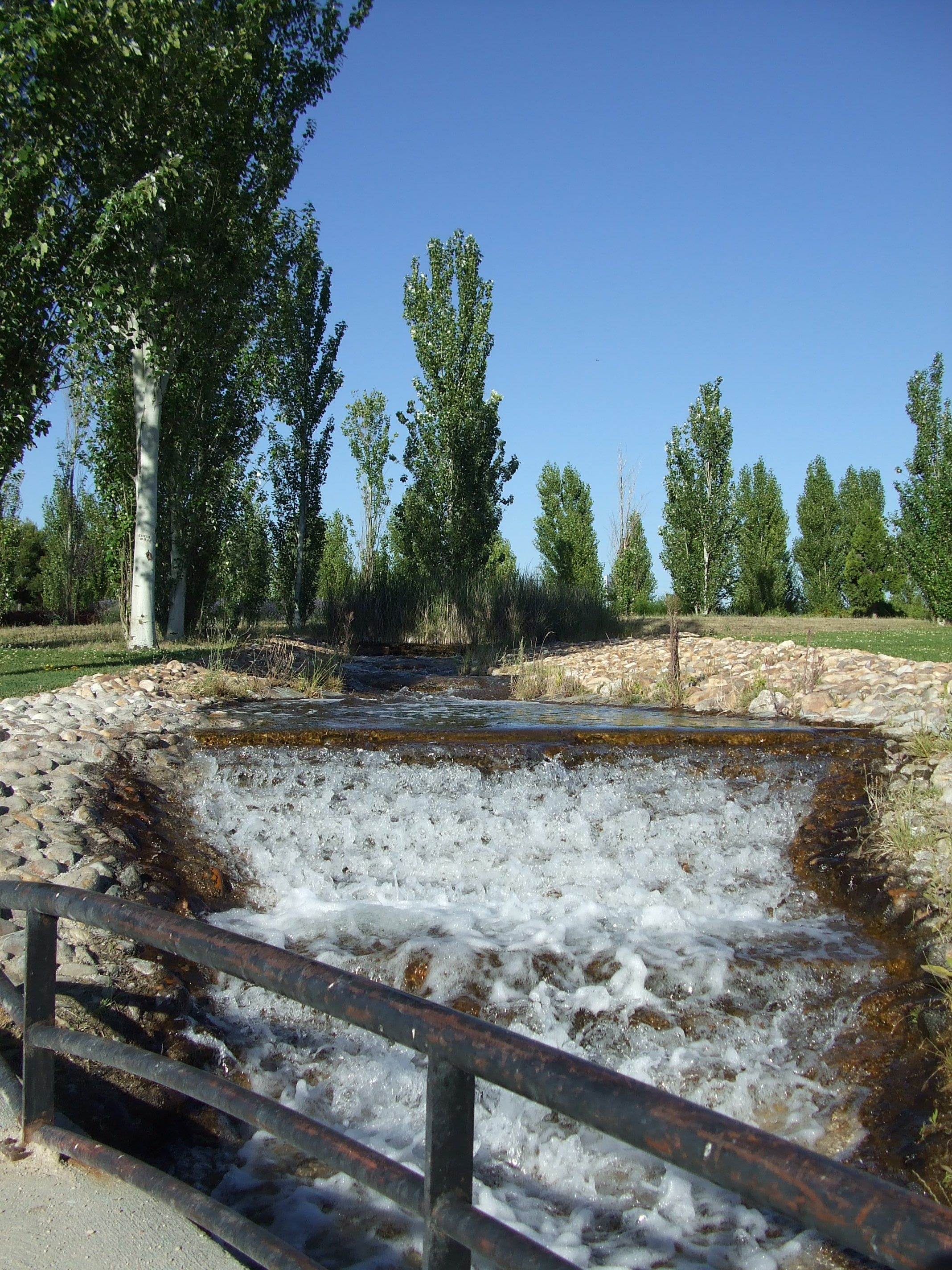 Arroyo proveniente de la fuente de piedra en el parque Juan Carlos I de Pinto